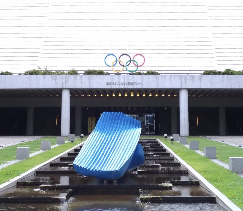 長野オリンピックミュージアムはこの長野市オリンピック記念アリーナ（エムウェーブ）の中に置かれている